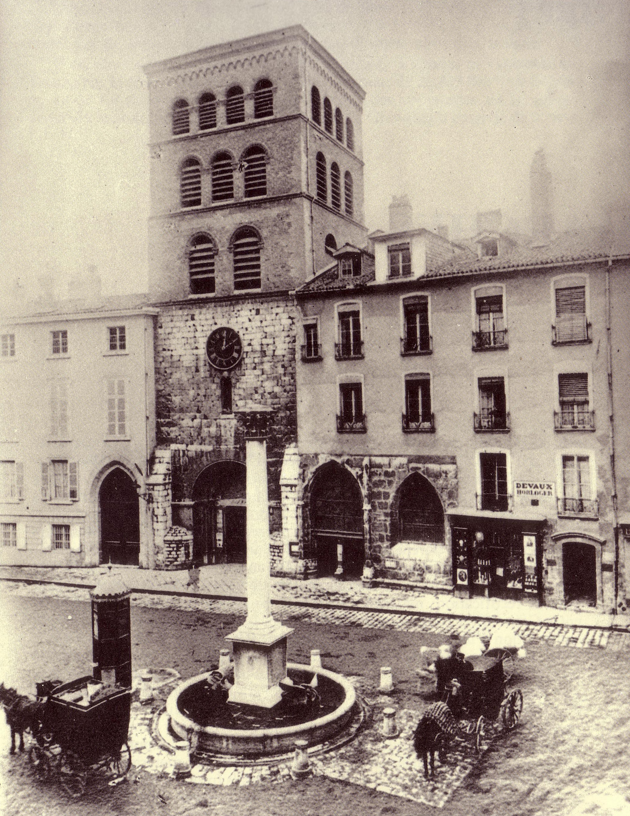 Place Notre-Dame à Grenoble vers 1880. La colonne au centre a été déplacée place de Metz au début des années 1890 et s'y trouve encore.